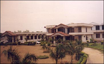 IMR Ghaziabad Image